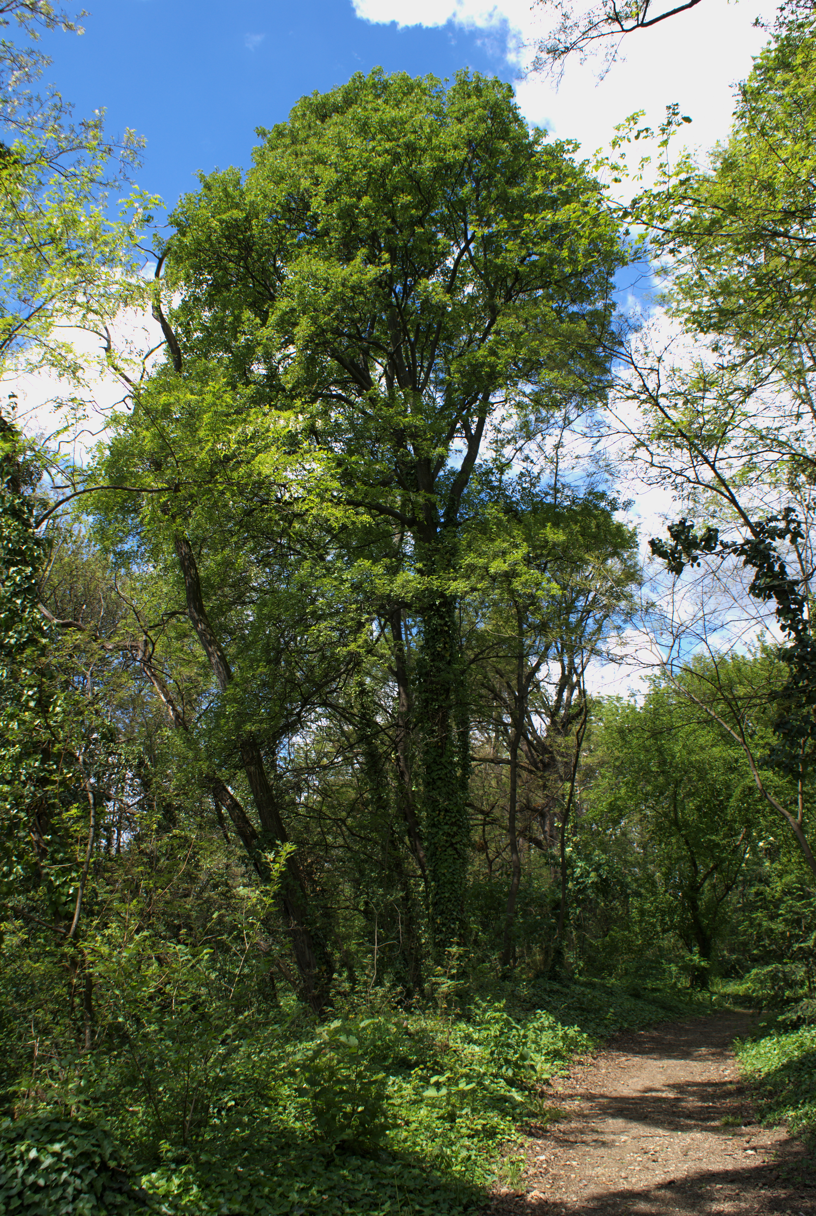 Sternwarteareal This media shows the natural monument in Vienna with the ID 713.